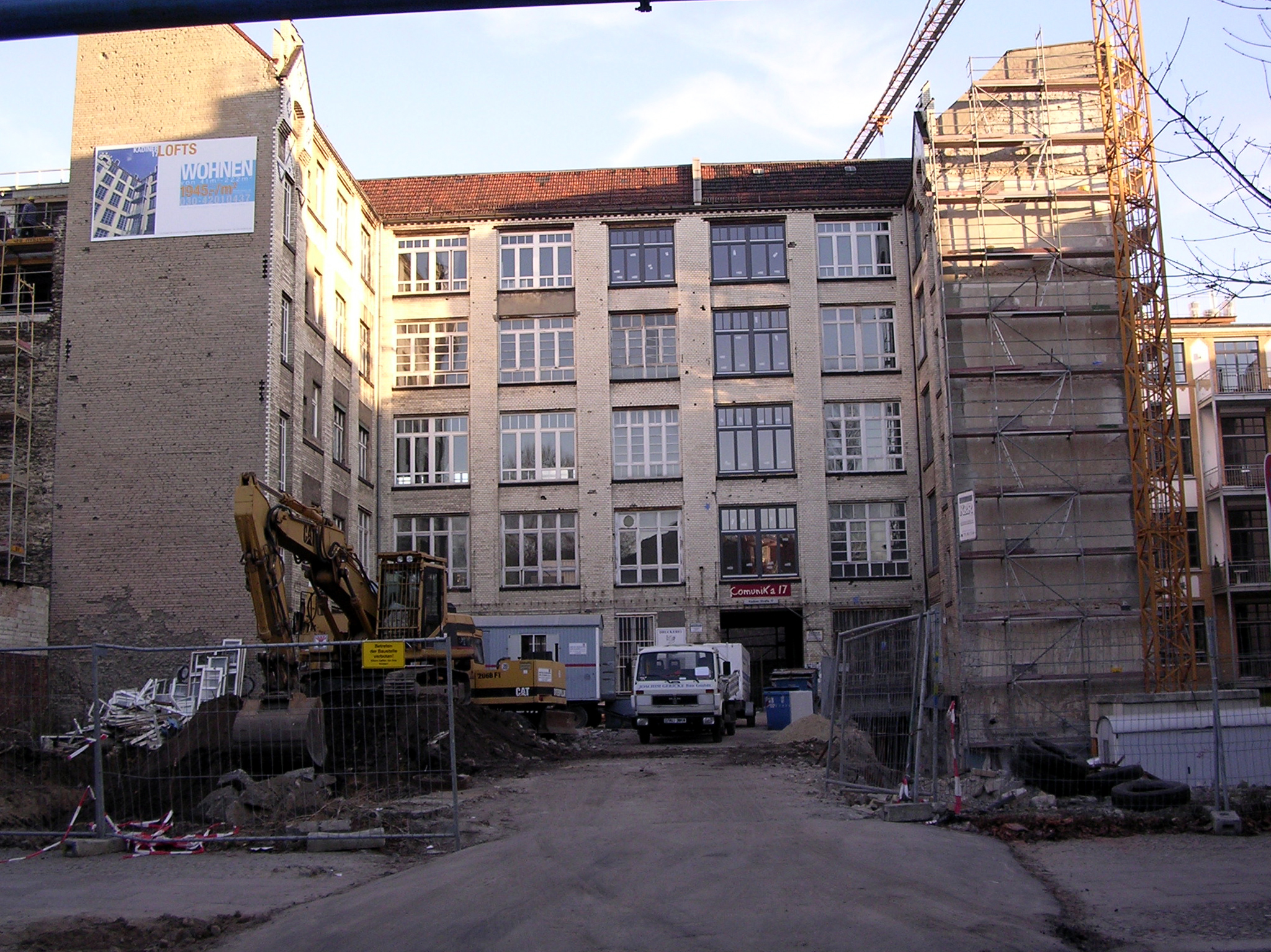 Quergebäude und Seitenflügel des alten Fabrikgebäudes Kadiner Straße 17 vor dem Umbau ab 2003, durch den Lofts und hochwertiger Wohnraum hier entstanden, wo bis dahin sich Werkstätten und kleine Unternehmen befanden, z. B. Horst Zocks „Mechanische Werkstätten“ und die Druckerei von Margarete Weber, aber auch Vereine und Klubs wie z.B. das Projekthaus Comunika 17, die Galerie Stufe 85 und der Club K 17.